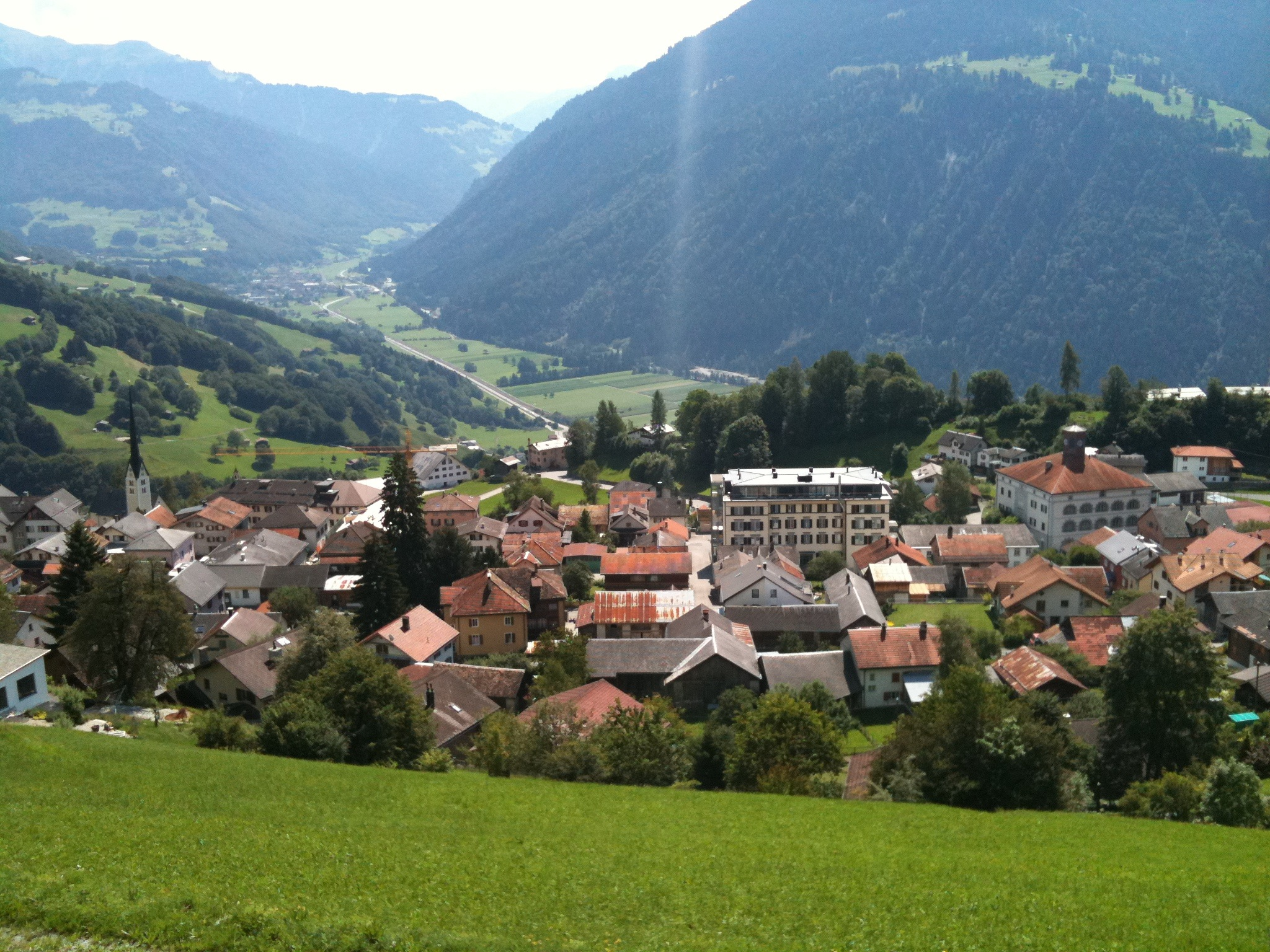 Seewis im Prättigau (Kanton Graubünden)